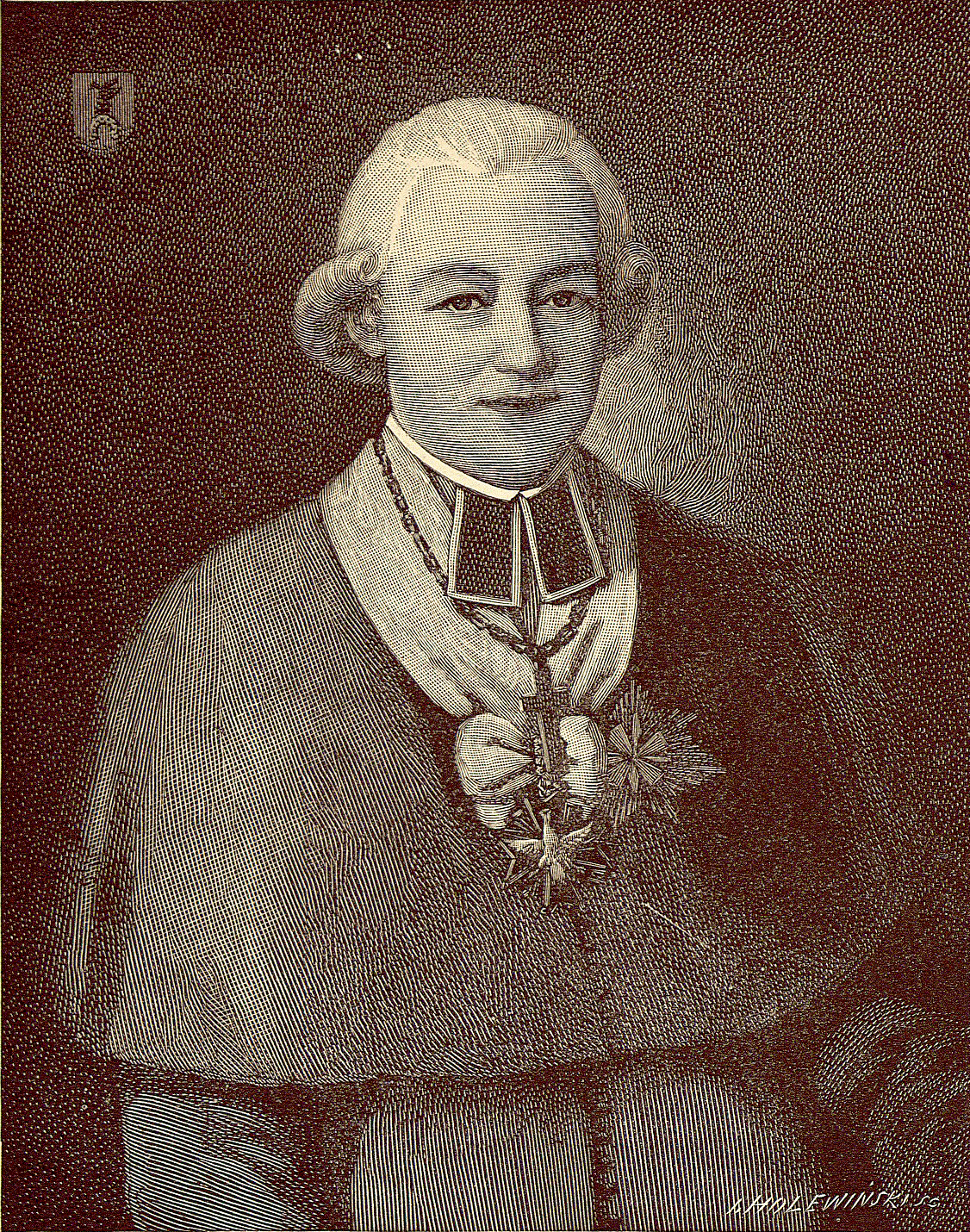 Беларуская (тарашкевіца): Партрэт Юзэфа Казімера Касакоўскага (Juzef Kazimier Kasakoŭski)